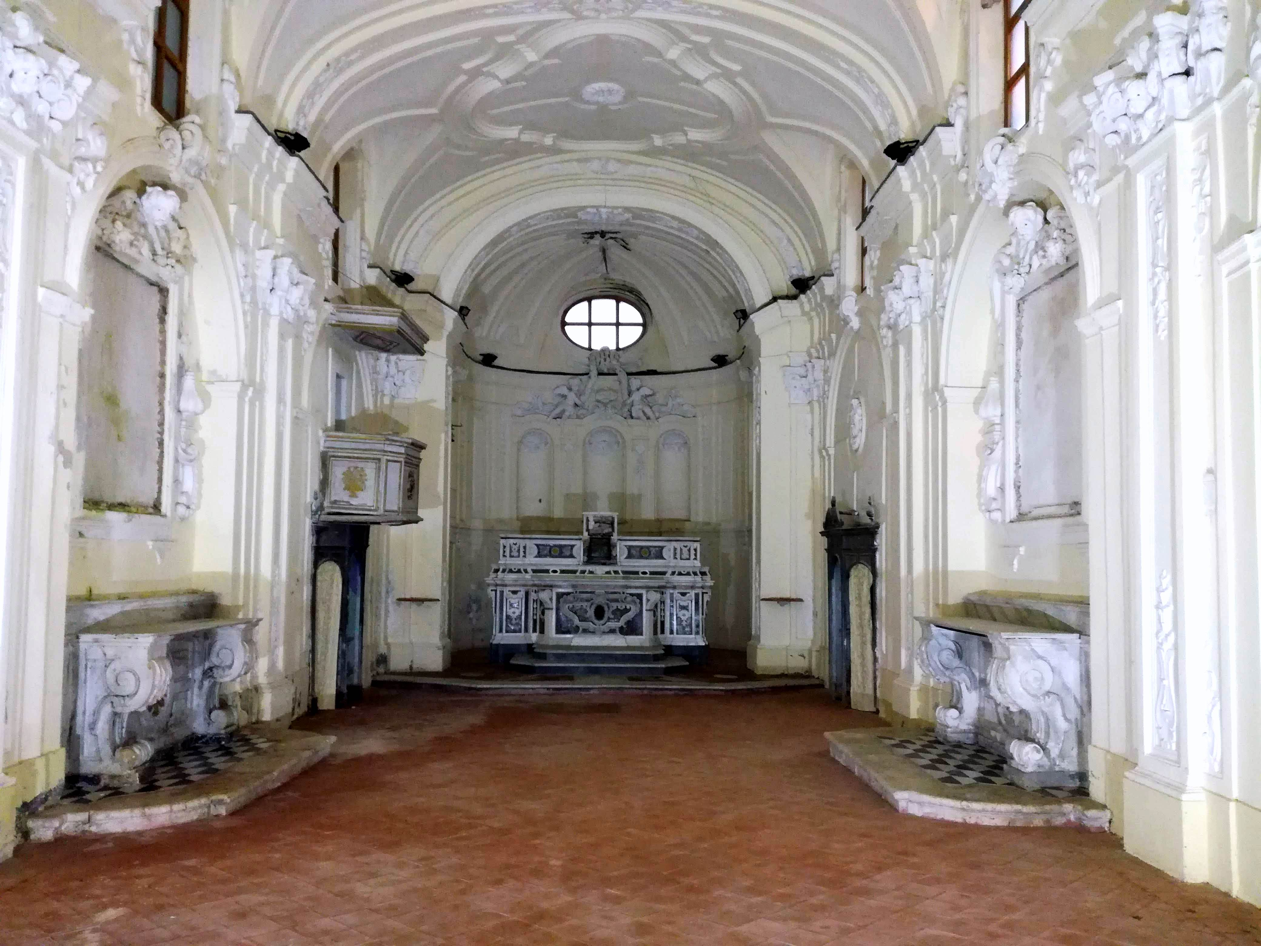 Interni Chiesa di San Sebastiano -Piedimonte Matese